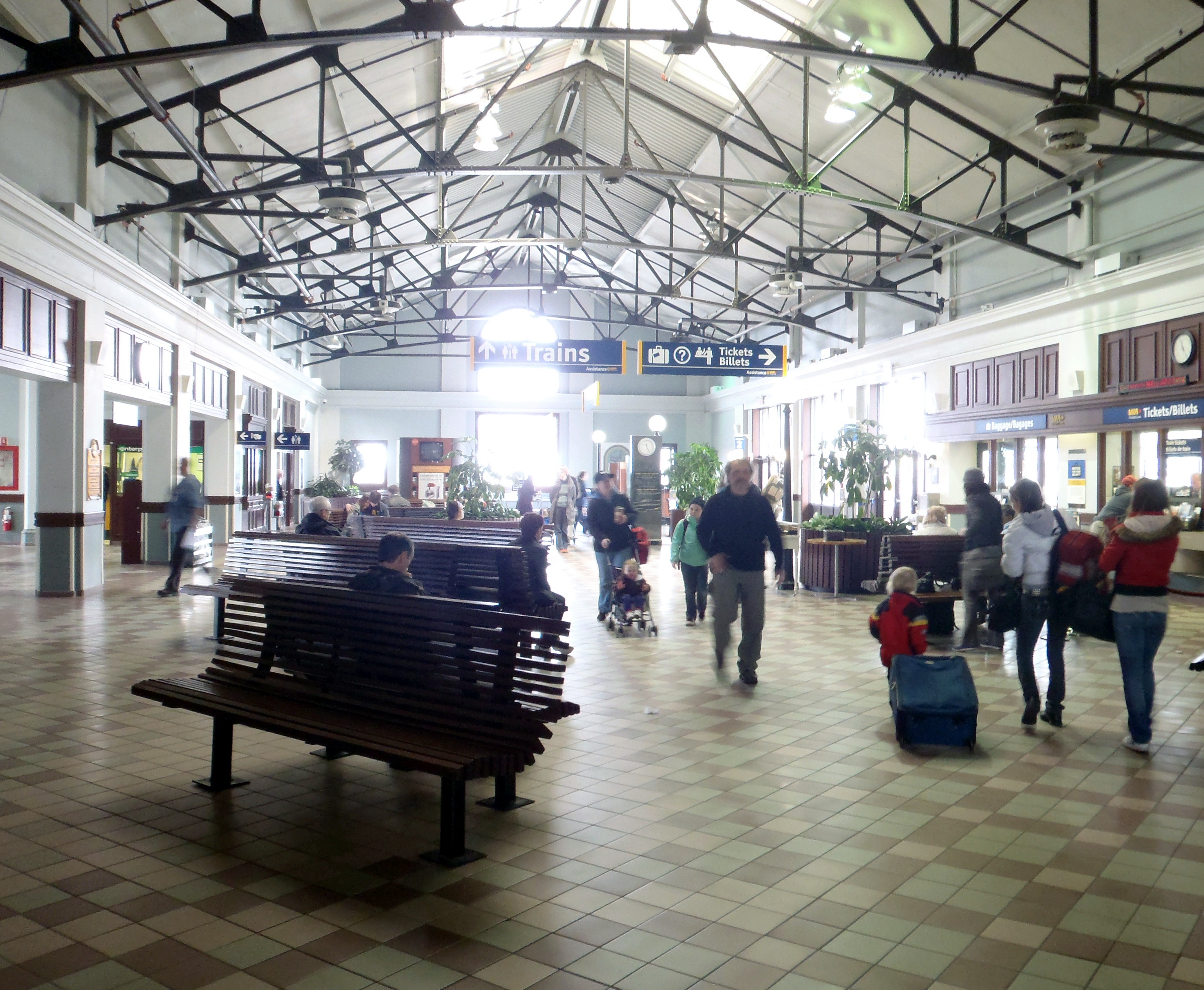 Halifax, Nova Scotia, Canada.